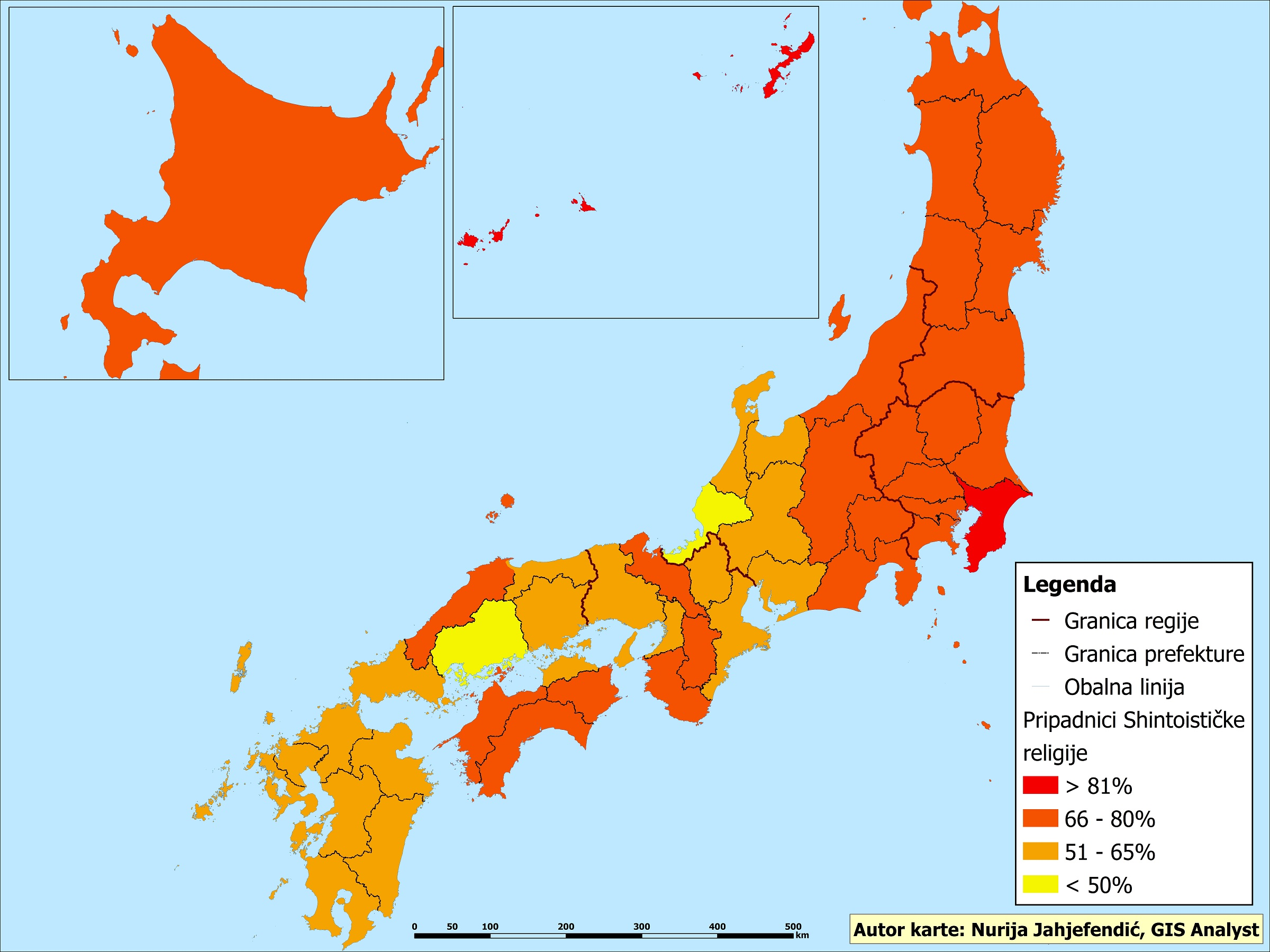 Pripadnici šintoističke religije u Japanu